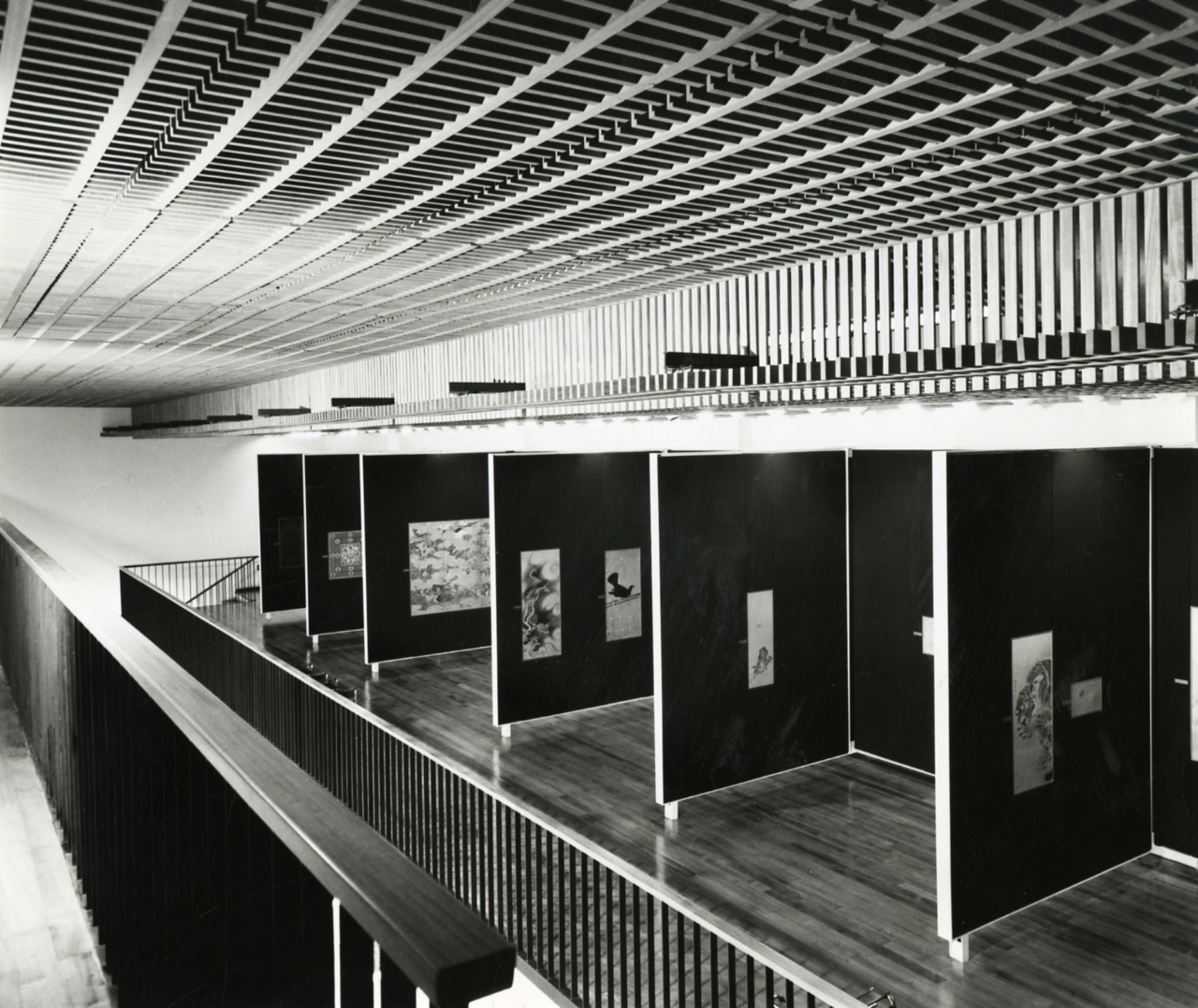 Genova. Museo d'Arte Orientale Edoardo Chiossone. Terza galleria. Pannelli con pitture giapponesi. Scale di accesso alle gallerie. Servizio fotografico : Genova, 1967 / Paolo Monti. - Stampe: 2 : Positivo b/n, gelatina bromuro d'argento/ carta, 24x30. - ((Al verso delle stampe manoscritti i numeri dei negativi corrispondenti: 17133, 17163. La stampa identificata con il n. 17163 è firmata in basso a destra. - Sul coperchio della scatola iscrizione didascalica manoscritta a pennarello nero: "Genova e Liguria/ Città storiche". - Il Museo, dopo la chiusura nel 1940, riaprì al pubblico il 7 Maggio 1971. - Occasione: Documentazione del nuovo allestimento del Museo Chiossone dell'Ingegnere Luciano Grossi Bianchi. - Fonte: Agenda di Paolo Monti: 4/ 30 marzo 1971/ / dal N° 16824 al N° 17956 (1971-1976), presso Archivio Paolo Monti. - Fonte: Monografia: Museo d'Arte Orientale E. Chiossone: catalogo provvisorio, Genova, Sagep (1971)